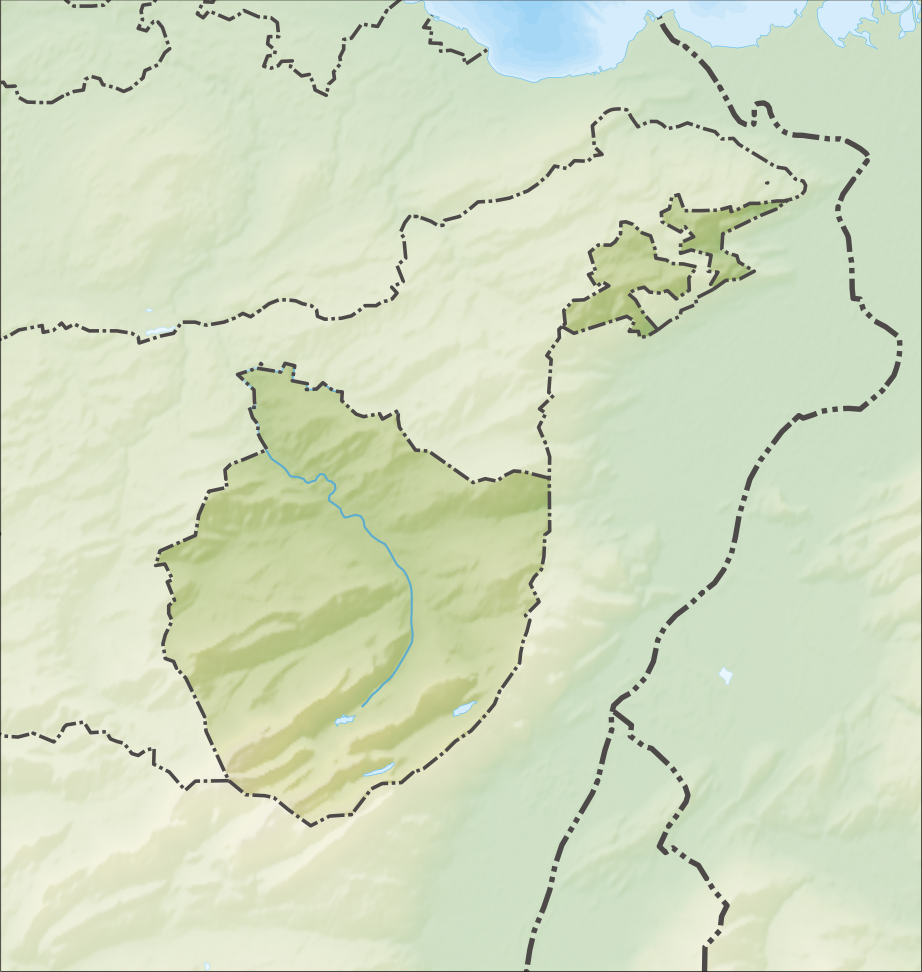 Reliefkarte des Kantons Appenzell Innerrhoden Topographischer Hintergrund: NASA Shuttle Radar Topography Mission (public domain). SRTM3 v.2.